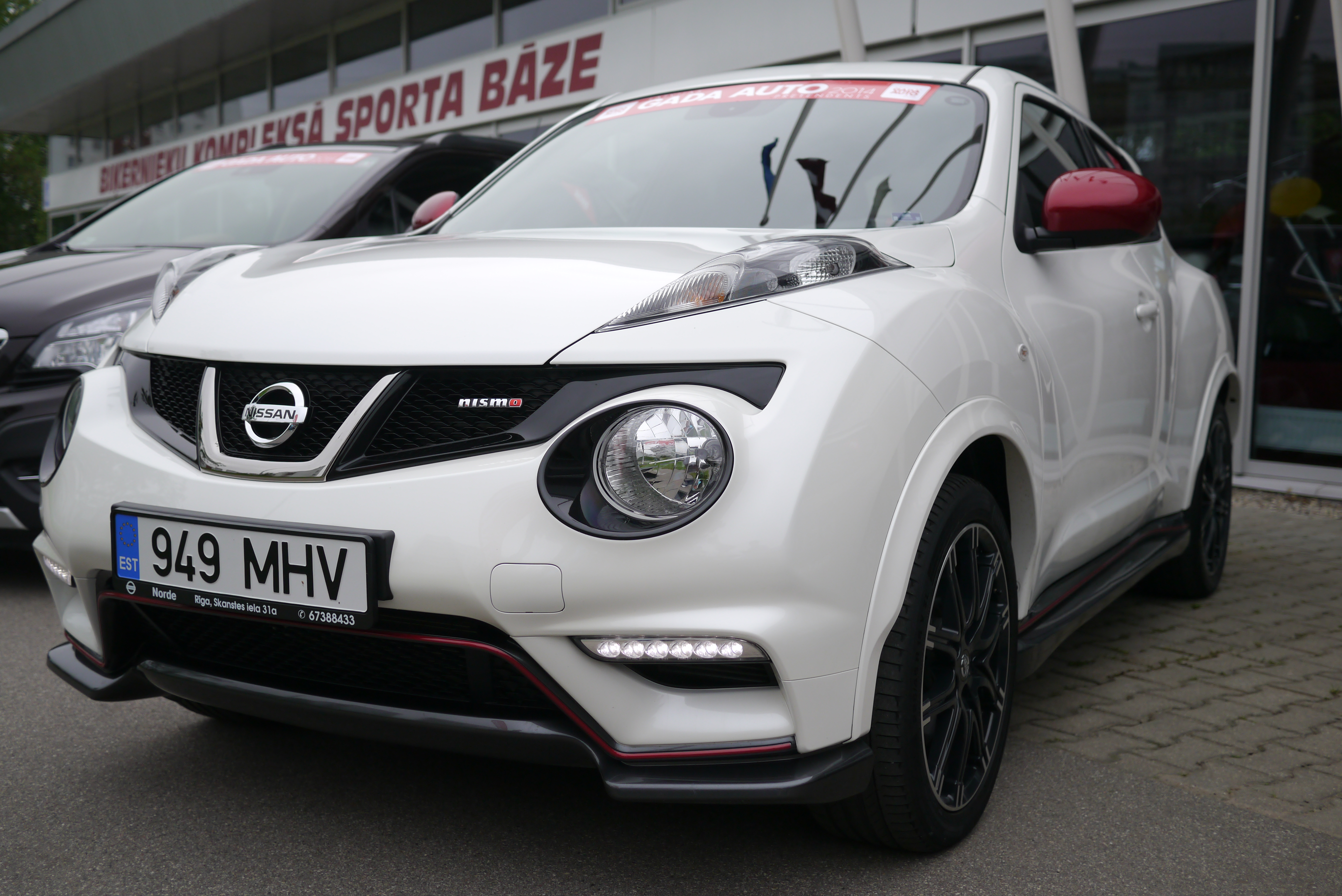 Latvijas gada auto 2014